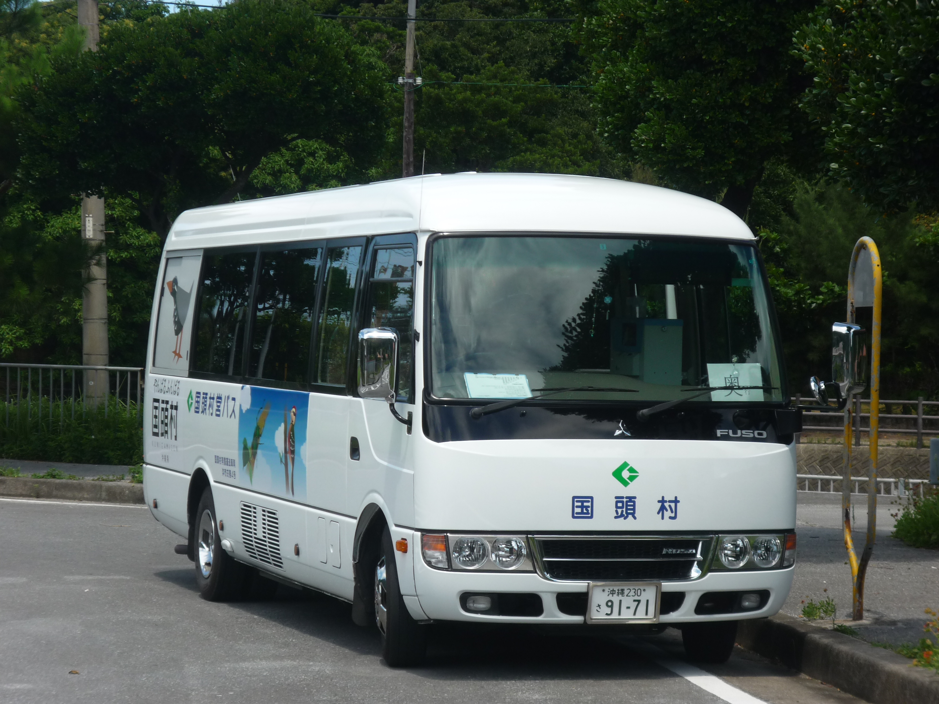 国頭村営バス（三菱車、2016年7月） Panasonic Lumix DMC-FS3